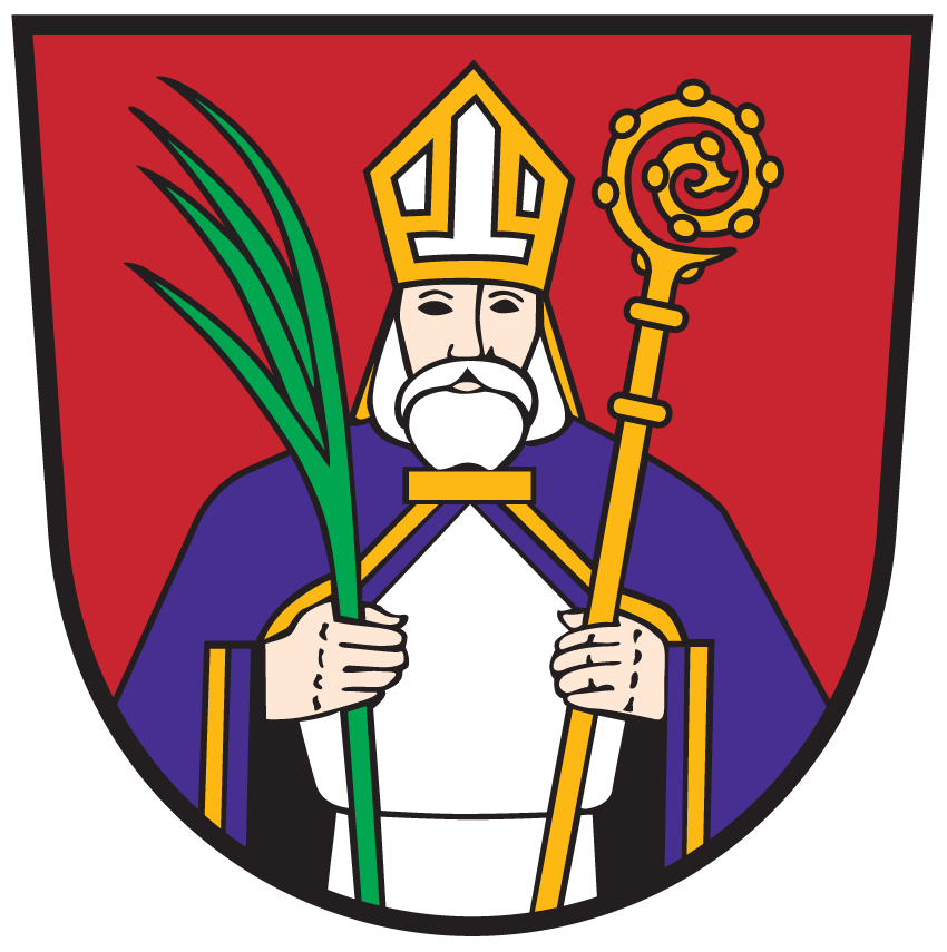 Wappenfigur: St. Hermagor